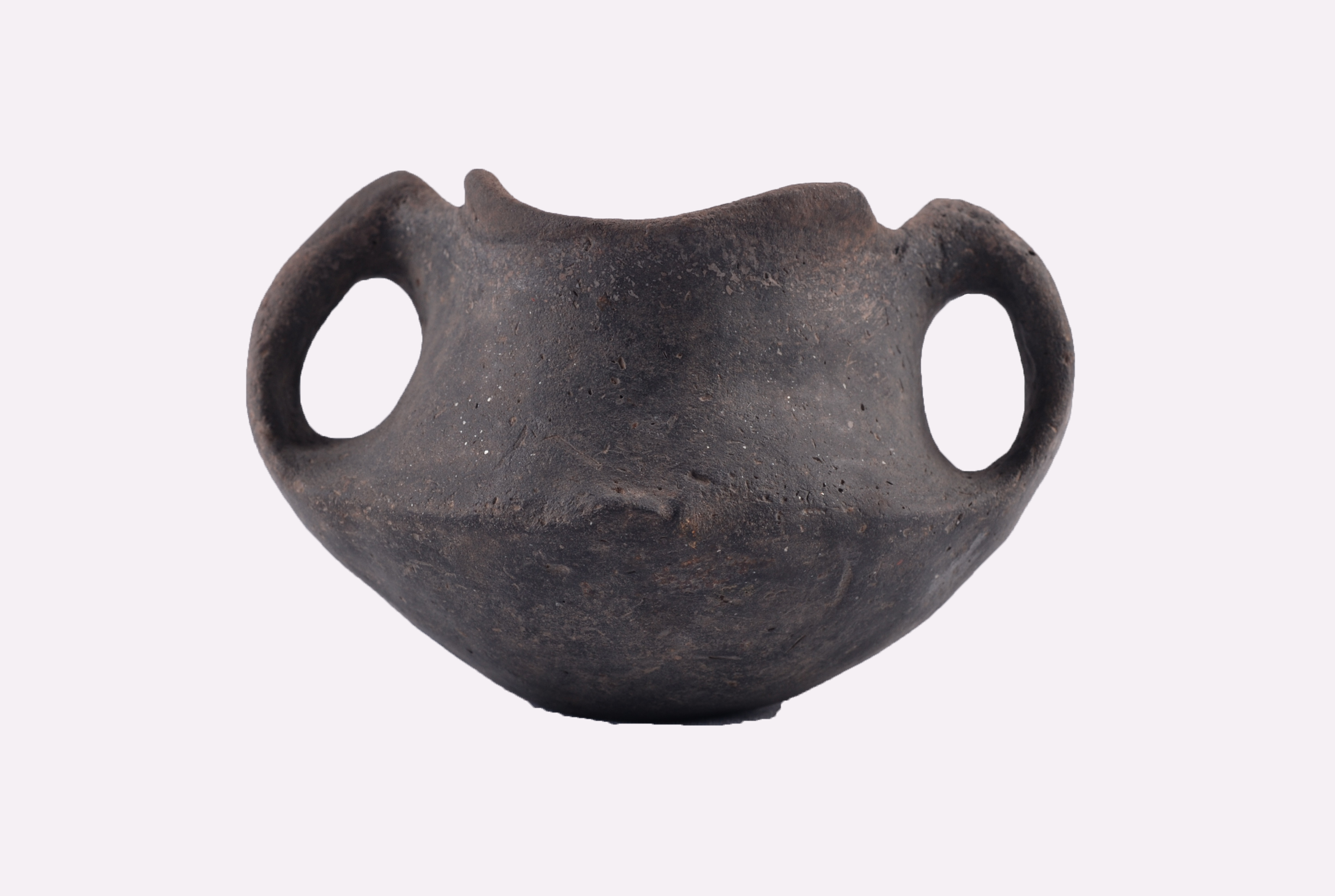 Srpski (latinica): Pehar od keramike iz perioda 1900-1500 g.p.n.e. Pronađen je na lokalitetu Groblje novo u Kaštavaru. Deo je praistorijske zbirke Narodnog muzeja u Leskovcu.